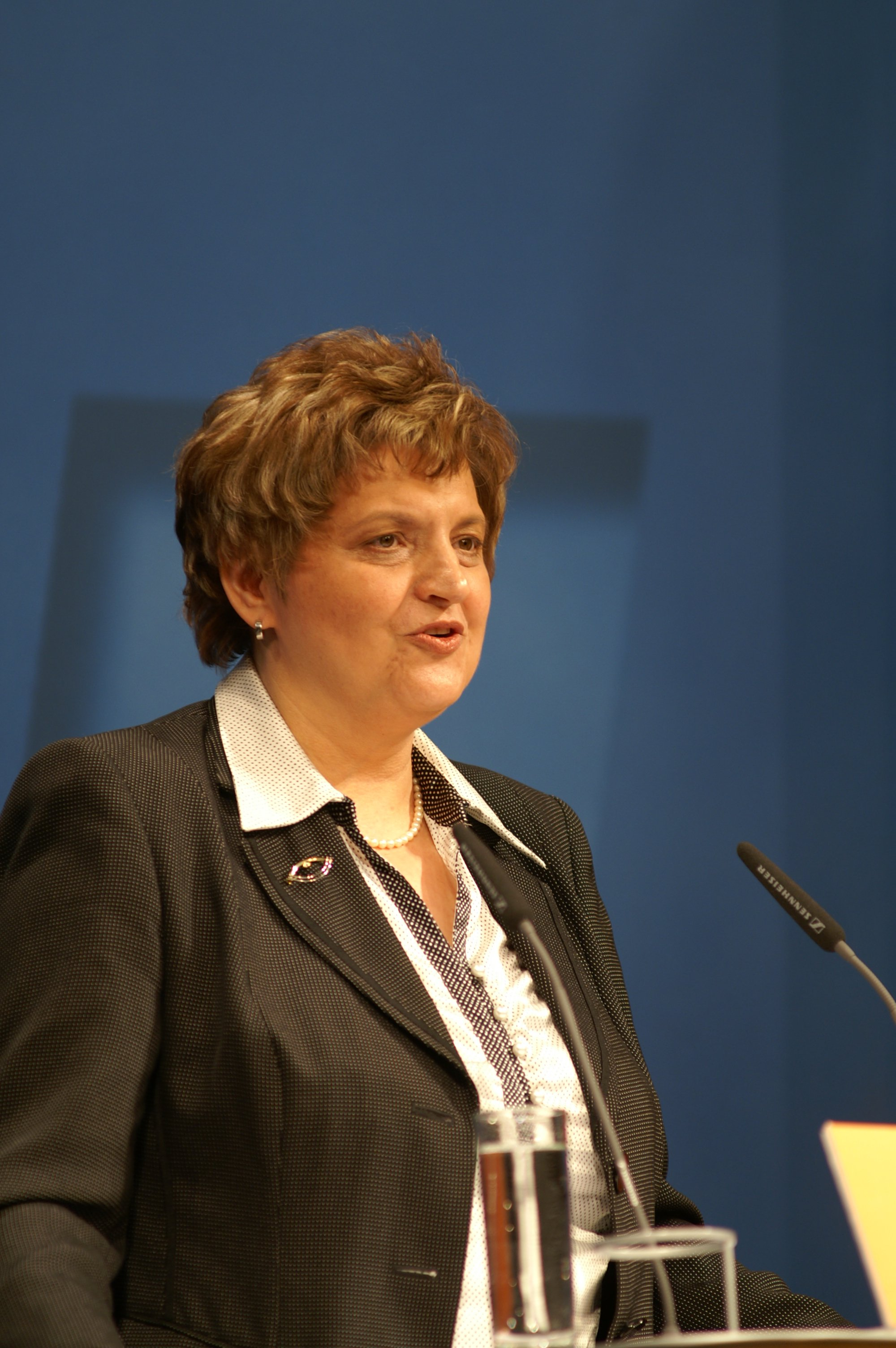 Birgit Diezel, Stellvertretende Vorsitzende der CDU-Thüringen und Thüringer Finanzministerin